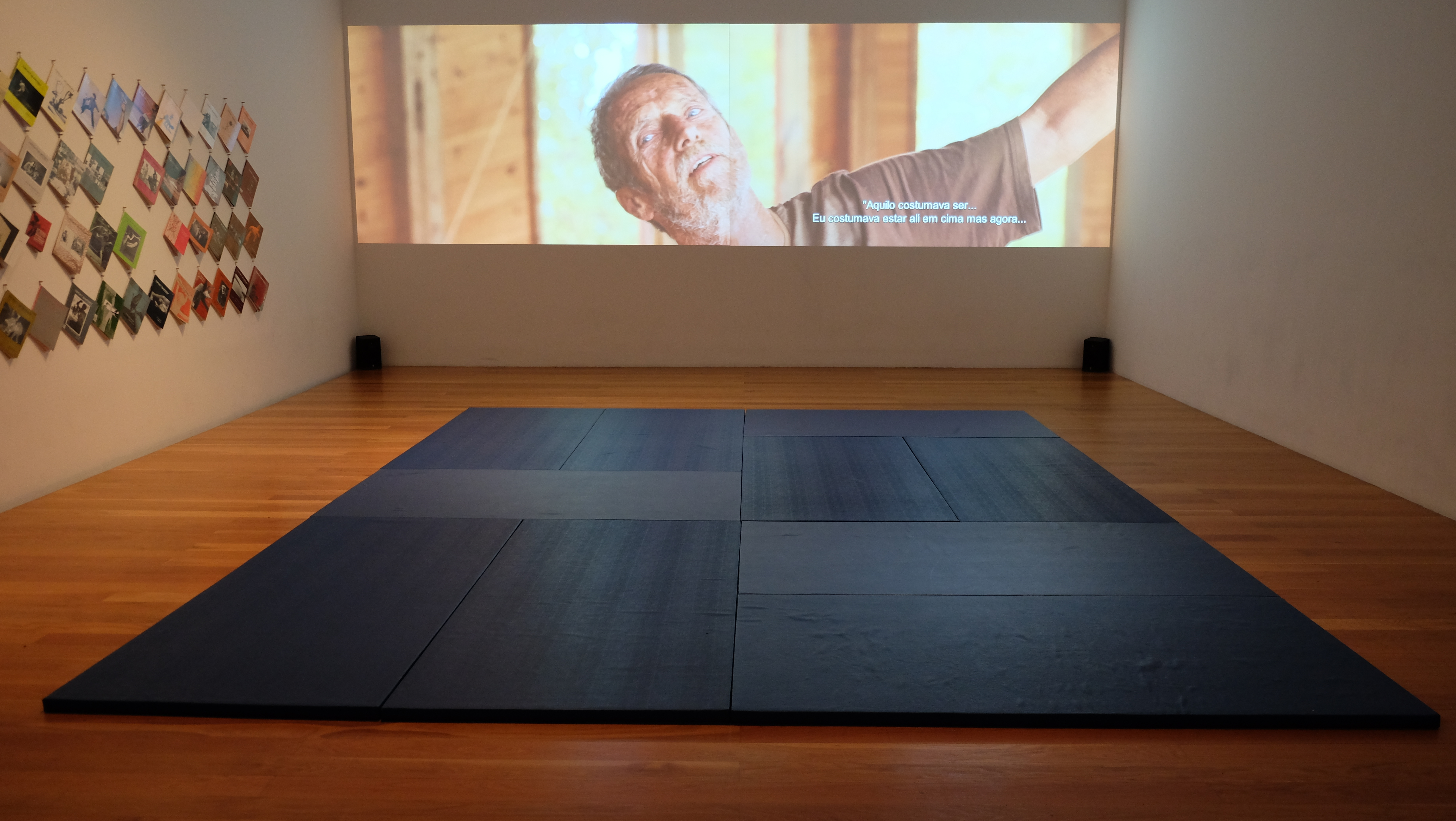 In March 2019, Culturgest presented Drafting Interior Techniques, a retrospective exhibition on Steve Paxton's work and legacy, co-curated by Joao Fiadeiro and Romain Bigé. This picture was taken in the room presenting the work of Bojana Cvejic and Lennart Laberenz (seen in the back).